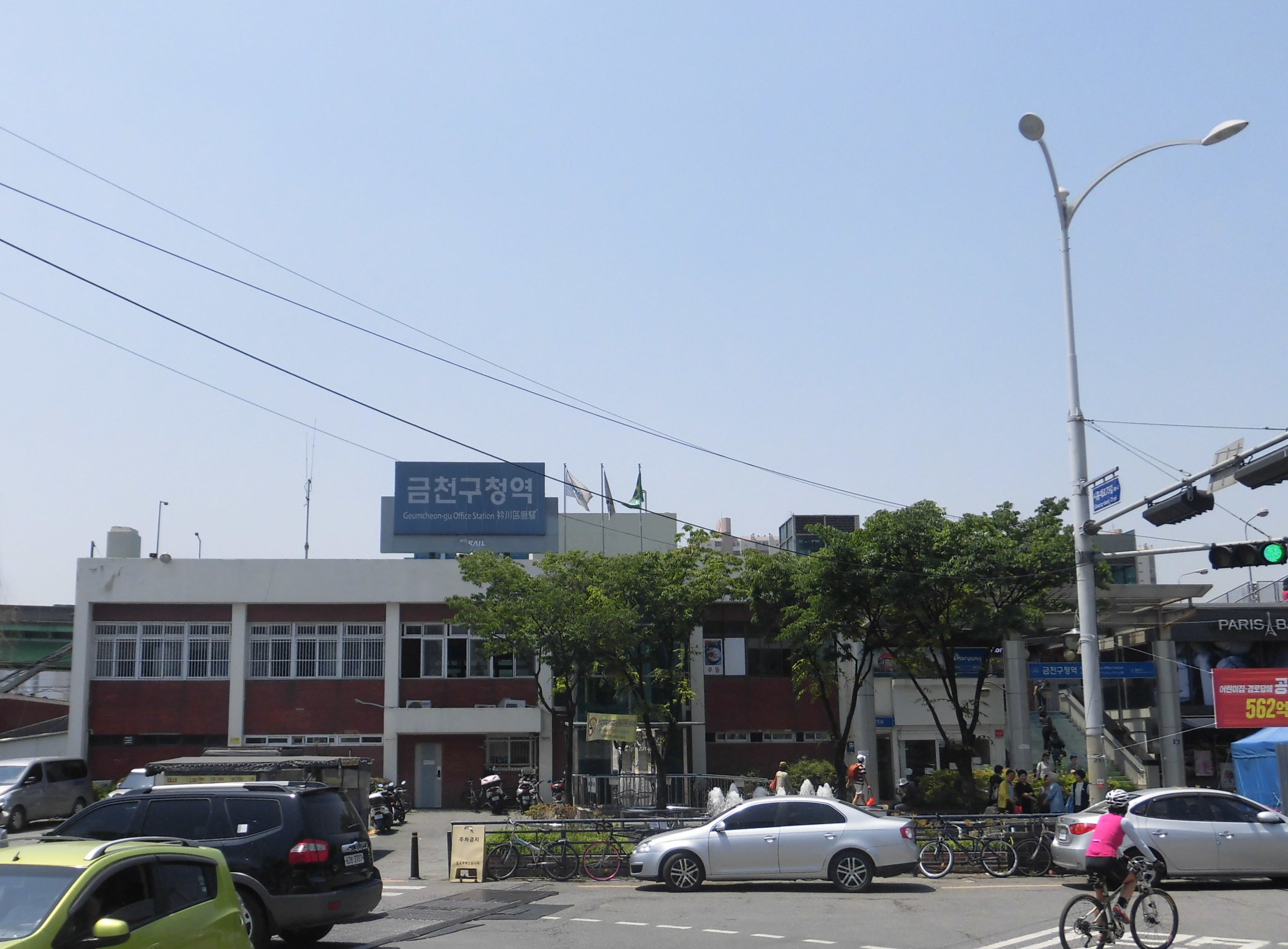 경부선 금천구청역